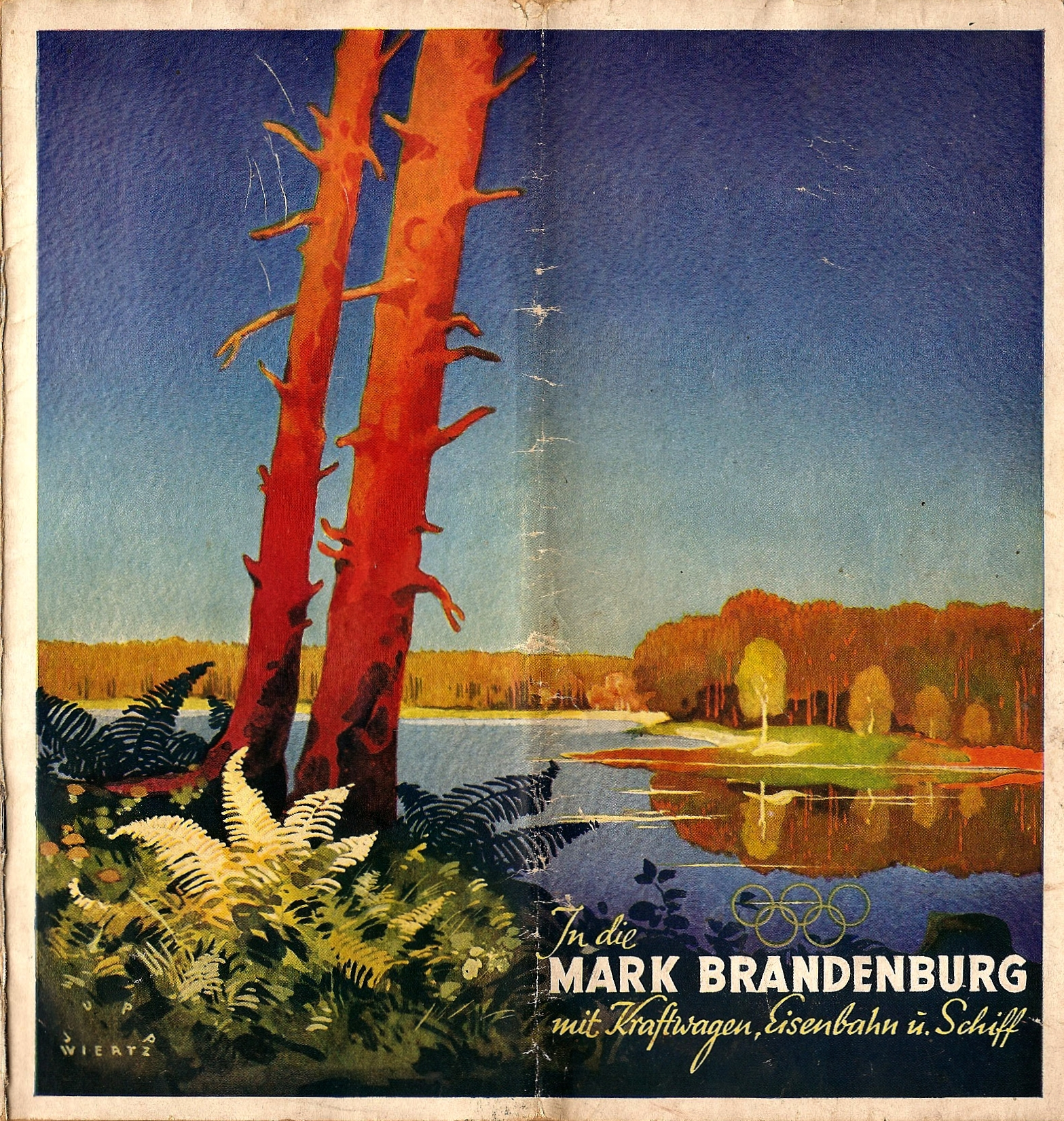 Umschlagbild des Grafikers Jupp Wiertz anläßlich des Olympischen Spiele 1936 in die Mark Brandenburg